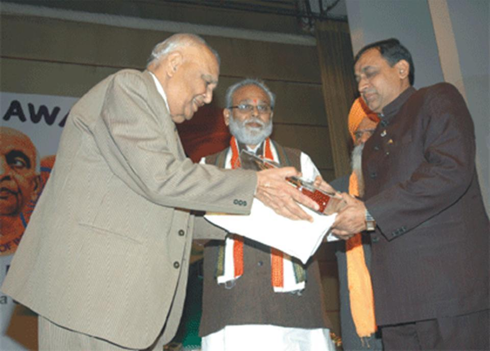 receiving sardar patel award